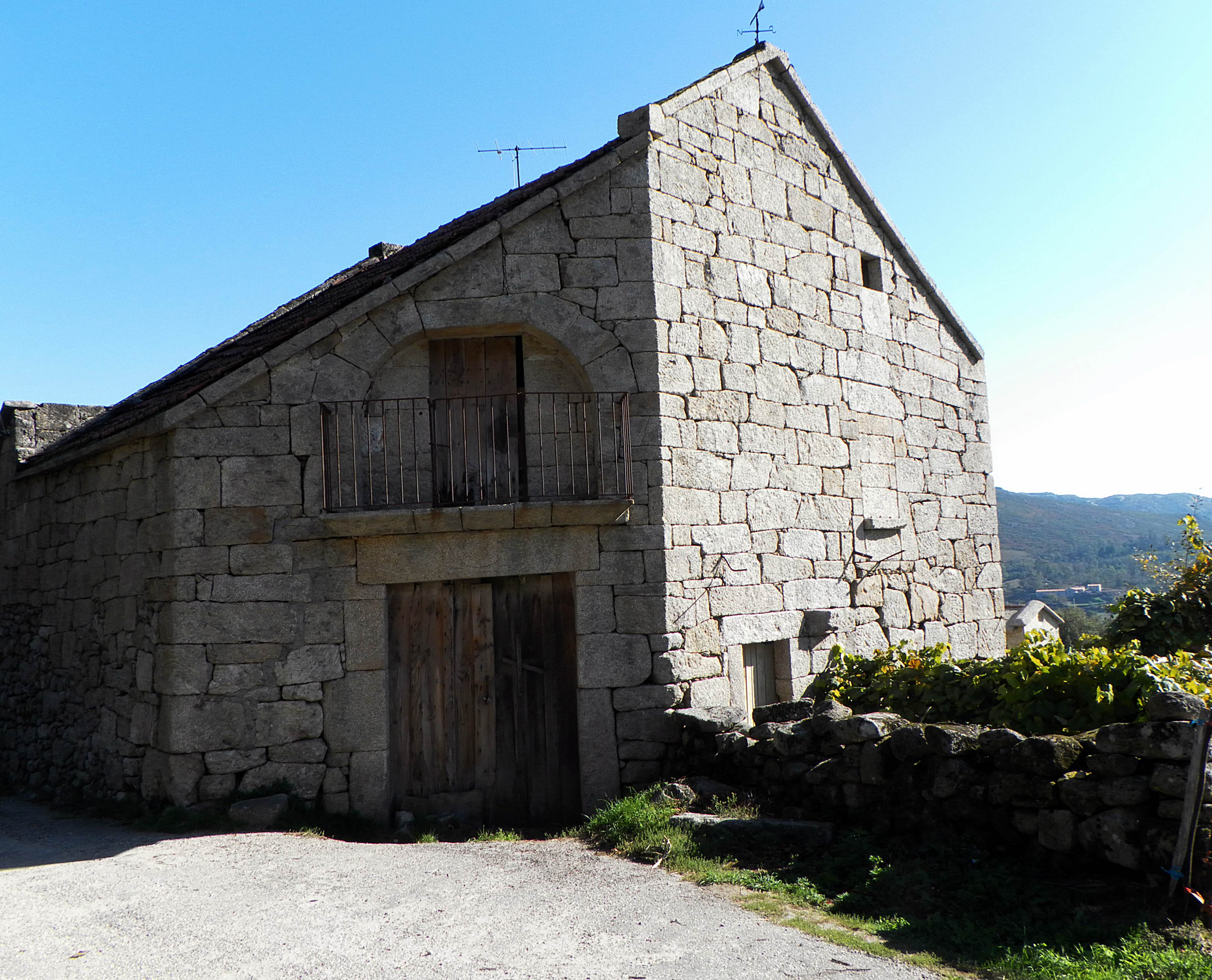 Trebellos-Aguasantas-Pontevedra